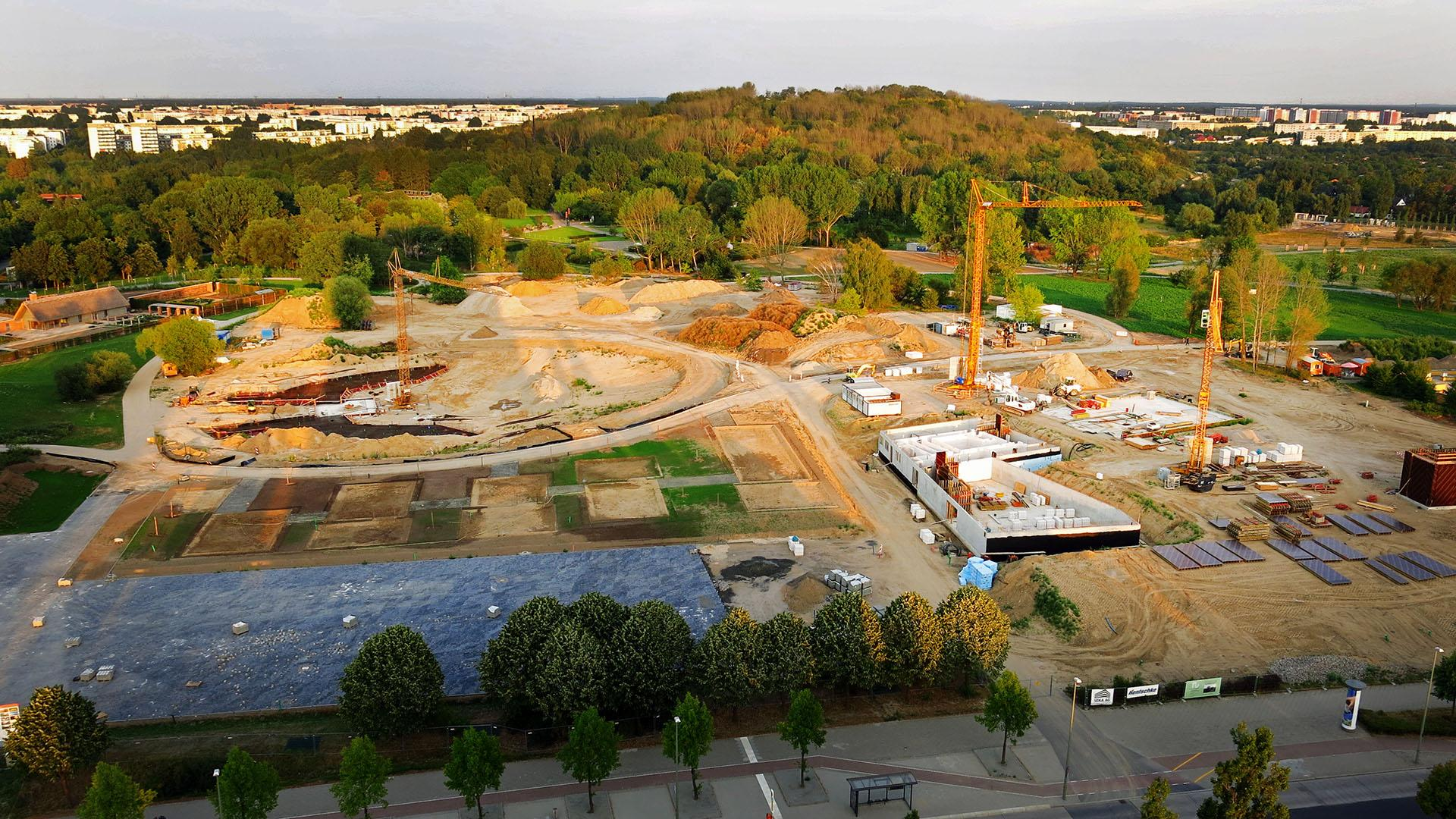 IGA-Haupteingang "Gärten der Welt" am Blumberger Damm aus der Vogelperspektive